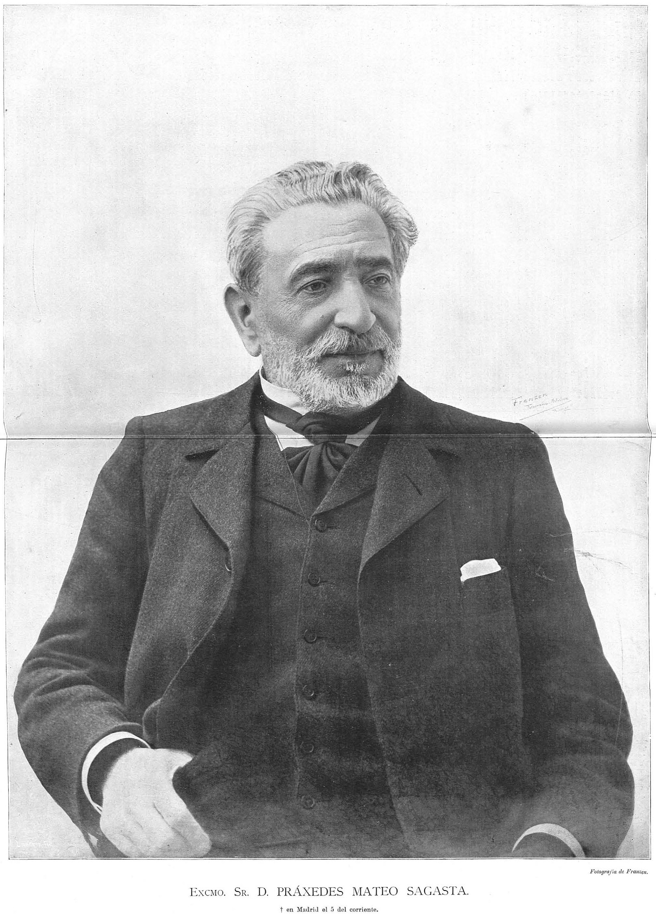 Retrato de Práxedes Mateo Sagasta, obra del fotógrafo Christian Franzen, recogido en la revista española La Ilustración Española y Americana.